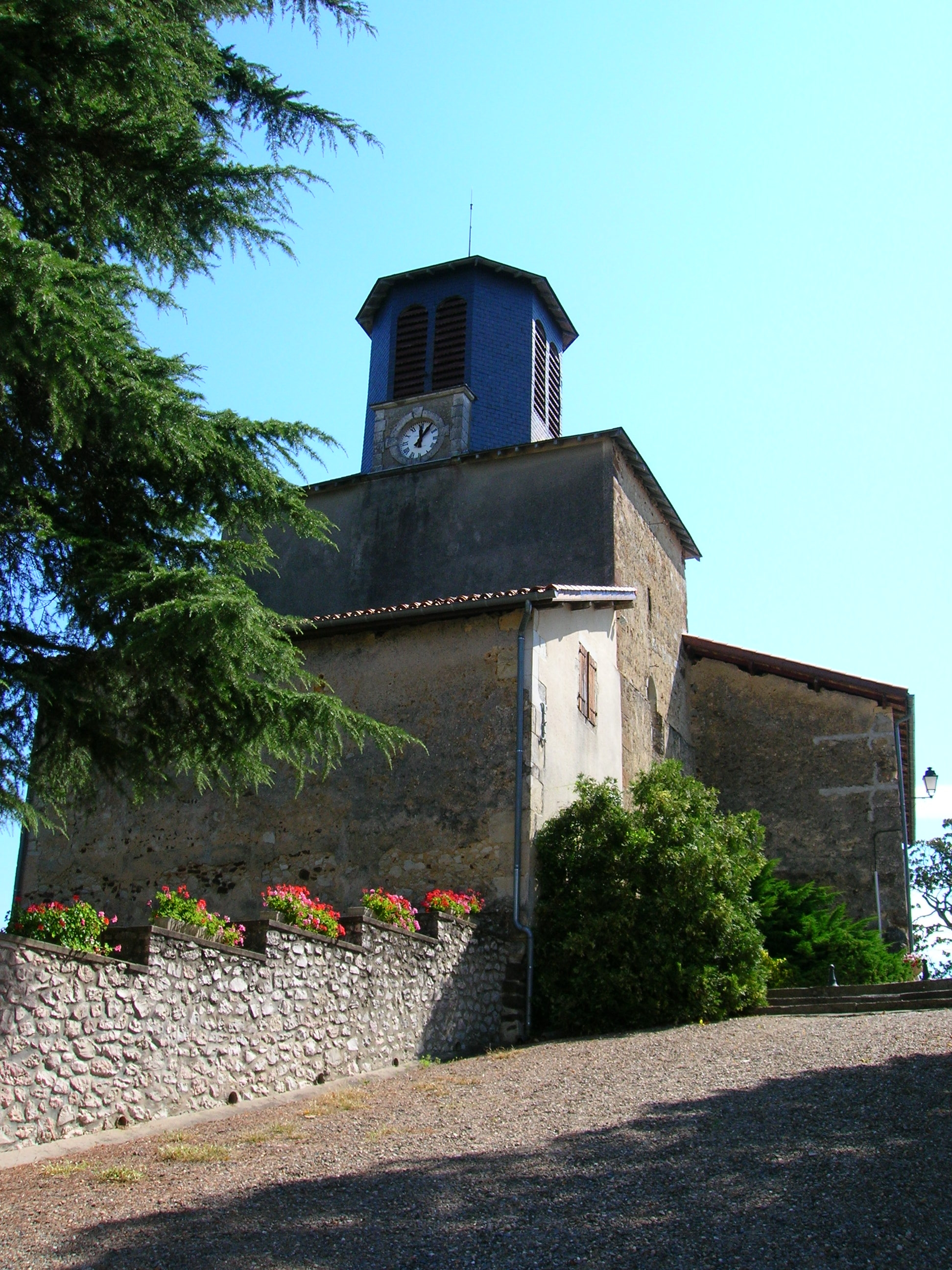 église de Baigts (40)